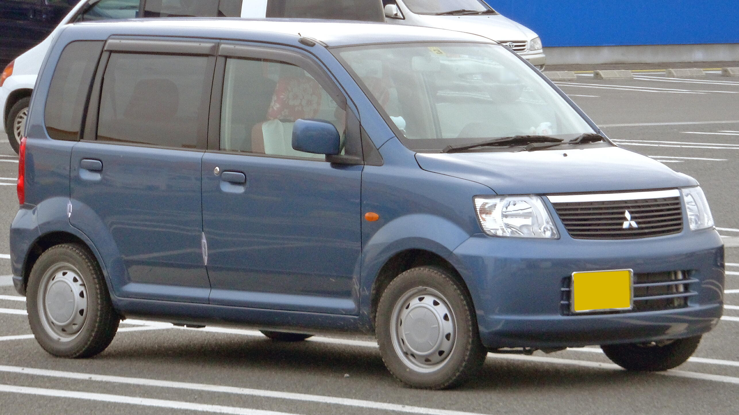 三菱・eKワゴン（初代・後期型）